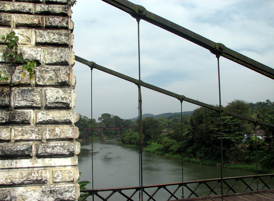 Punalur Bridge